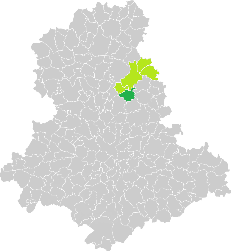 Carte de situation de la commune de Razès (en vert foncé) dans le votre Canton (en vert clair) sur une carte des communes de la Haute-Vienne